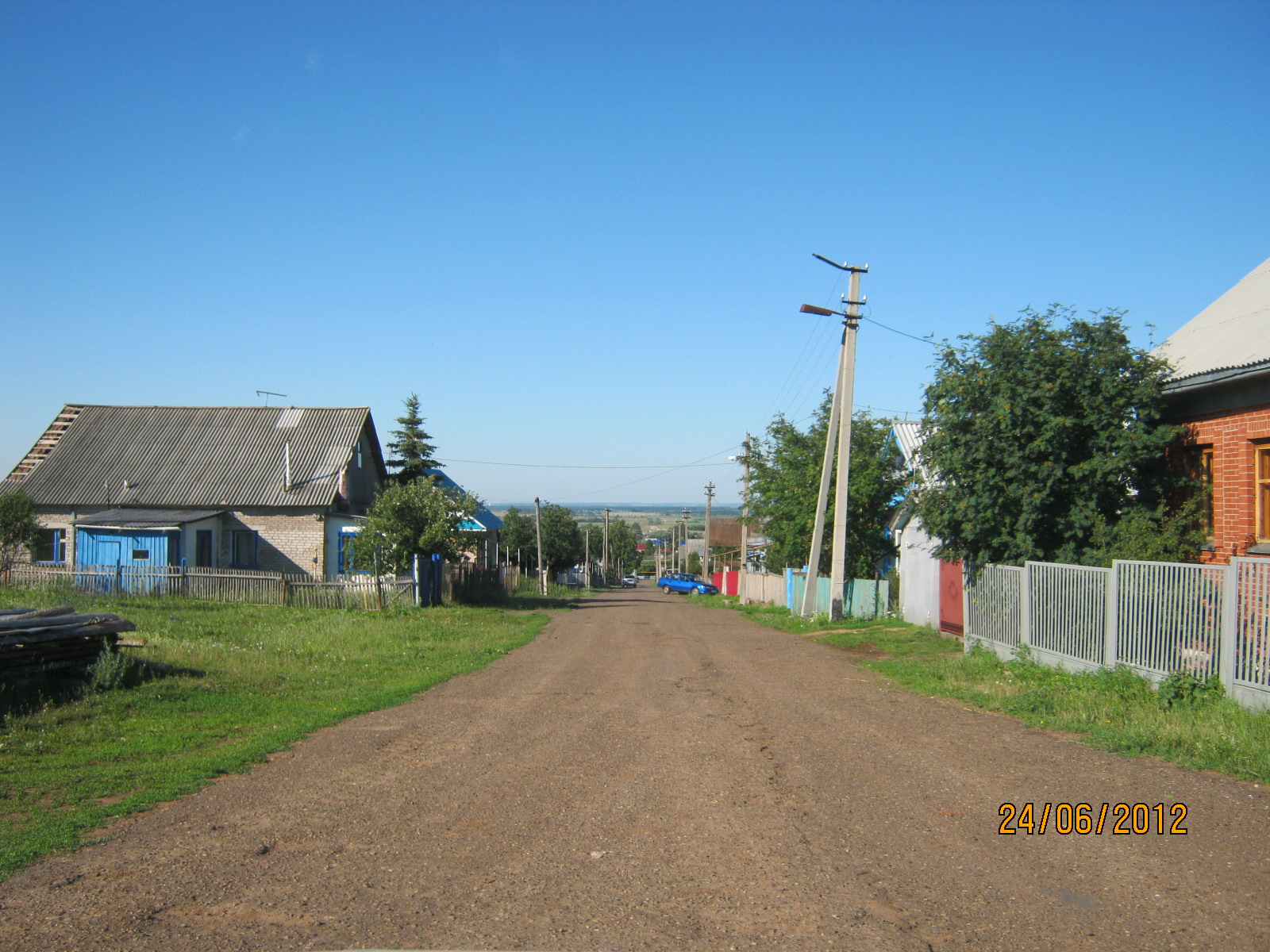 Ул. Тукая